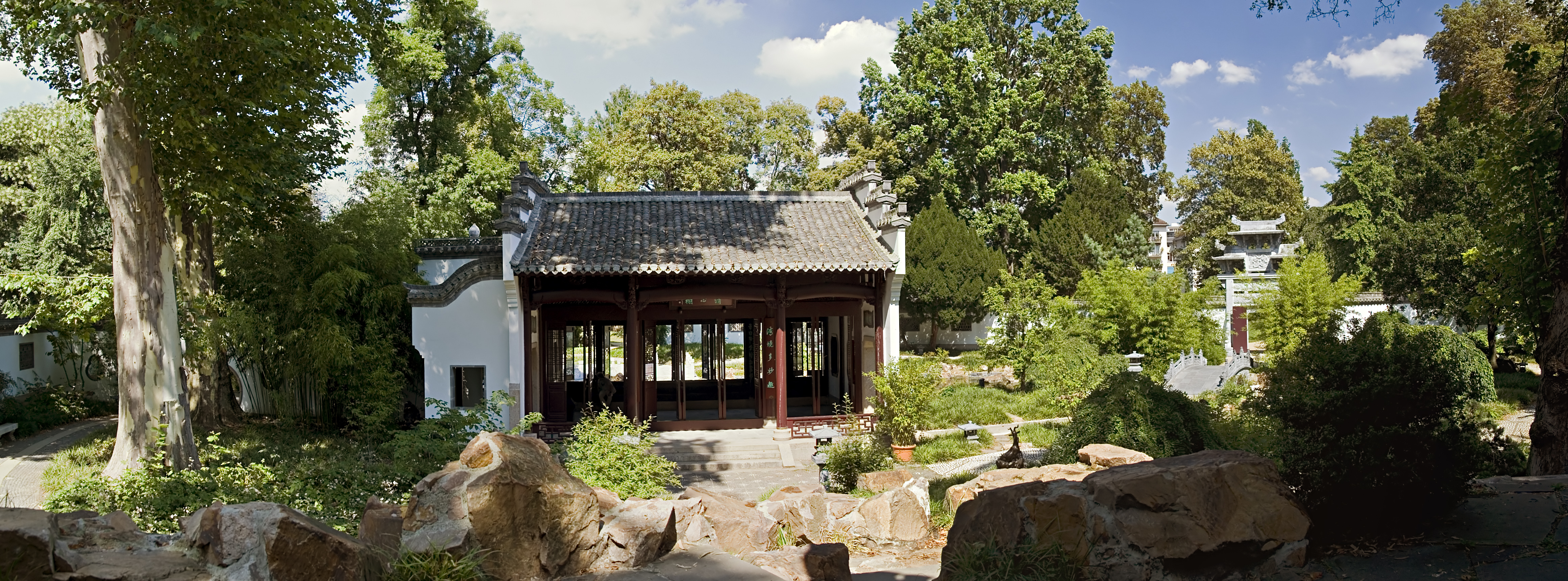 Spielzeugkiste, Chinesischer Garten im Frankfurter Bethmannpark